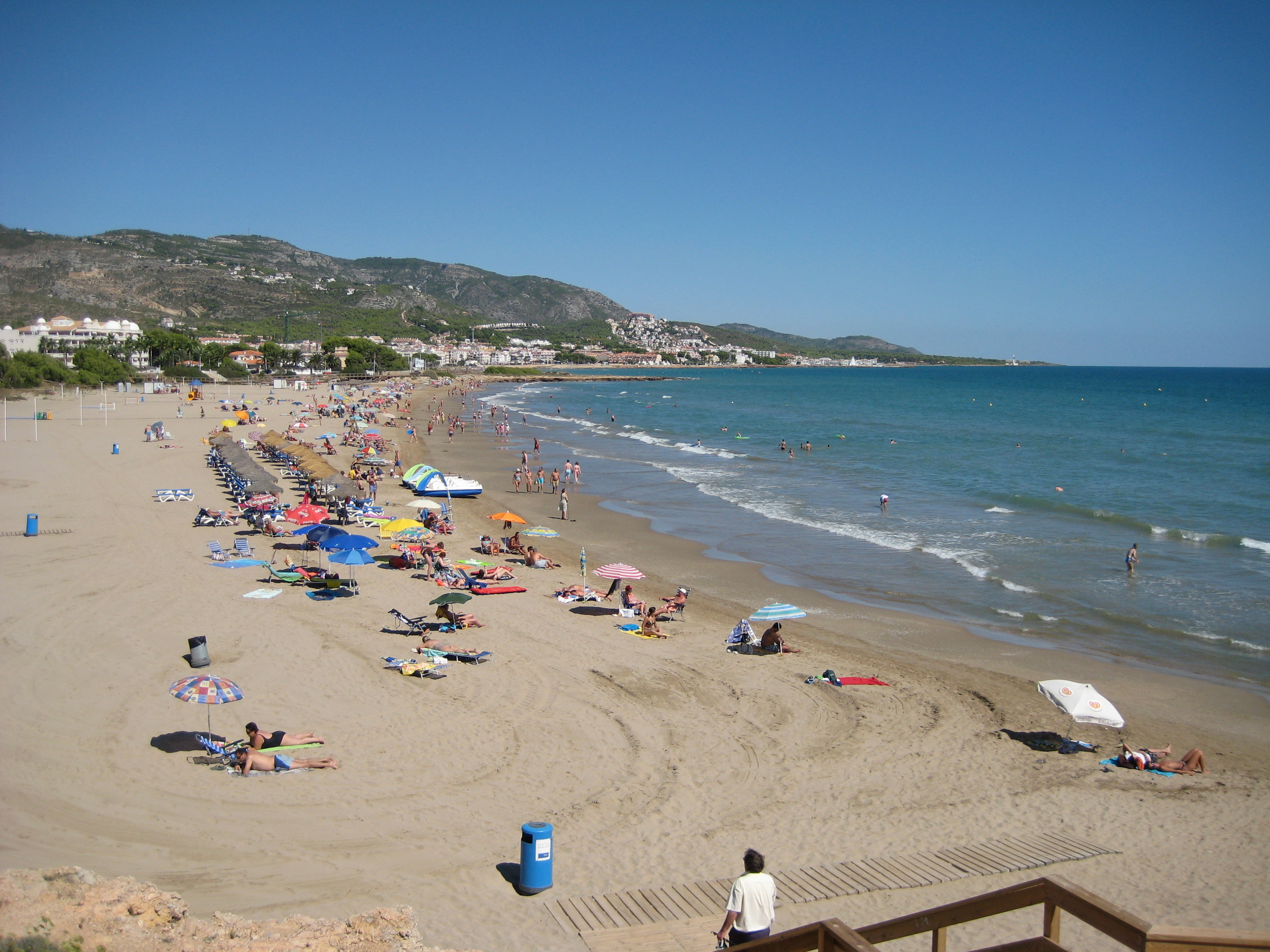 Platja Romana d'Alcalà de Xivert